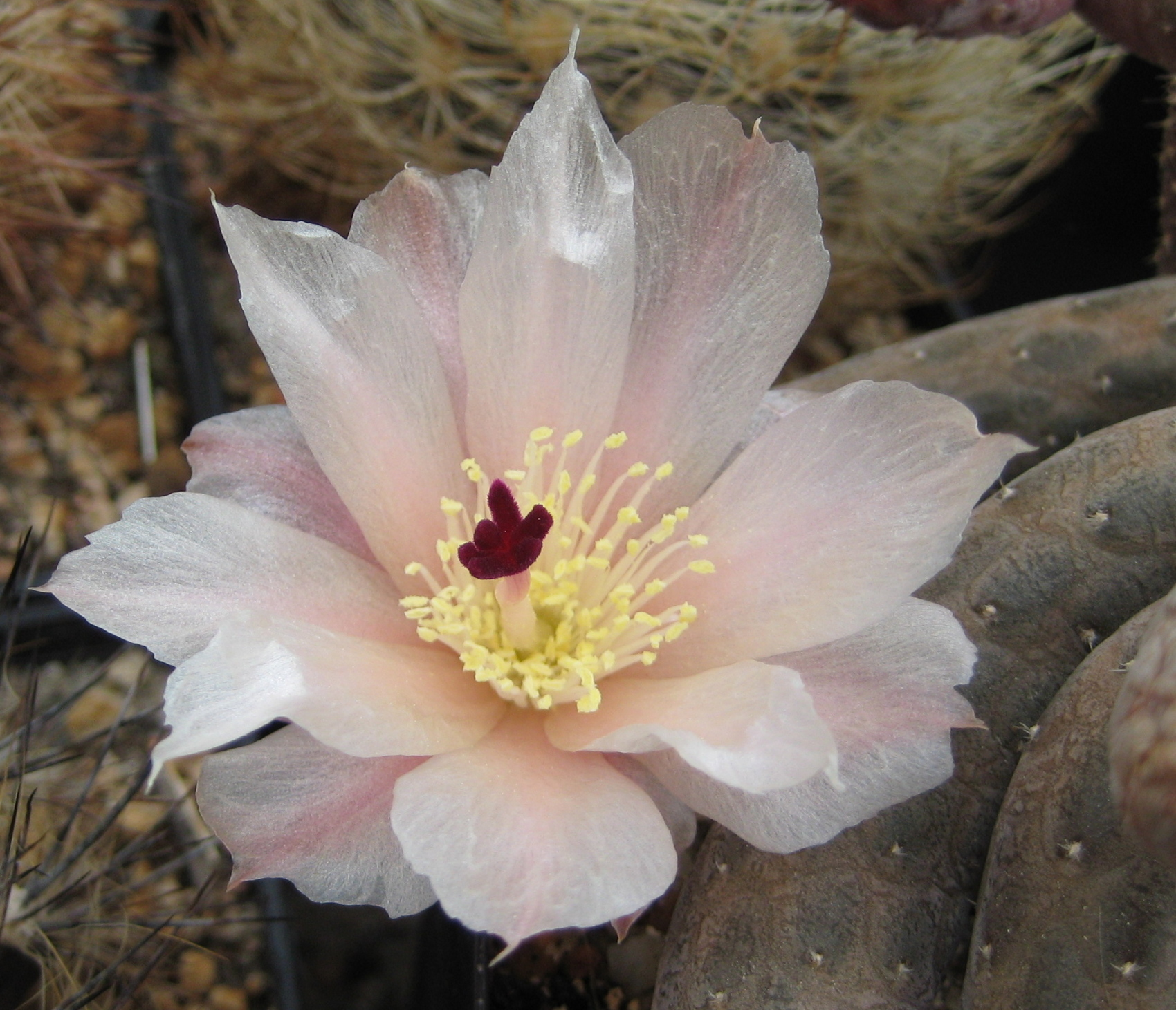 Pterocactus reticulatus in Kultur